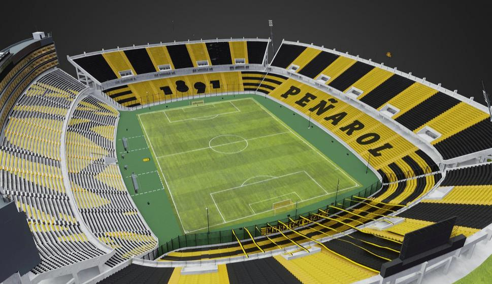 Render del estadio Campeón del Siglo terminado